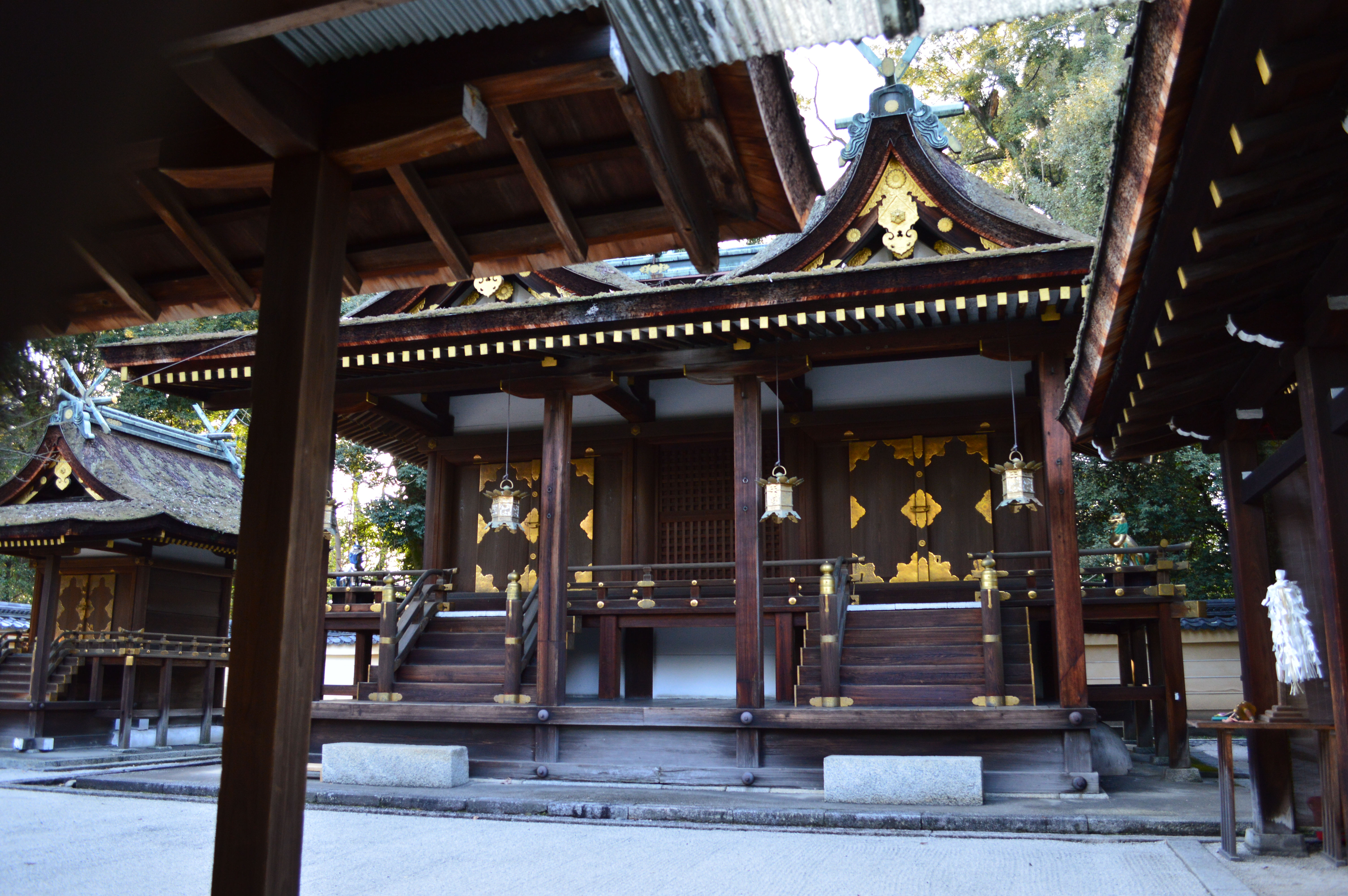 平野神社 (京都市) 本殿 (第三殿・第四殿)